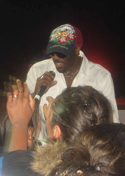 Concert au Dôme de Marseille